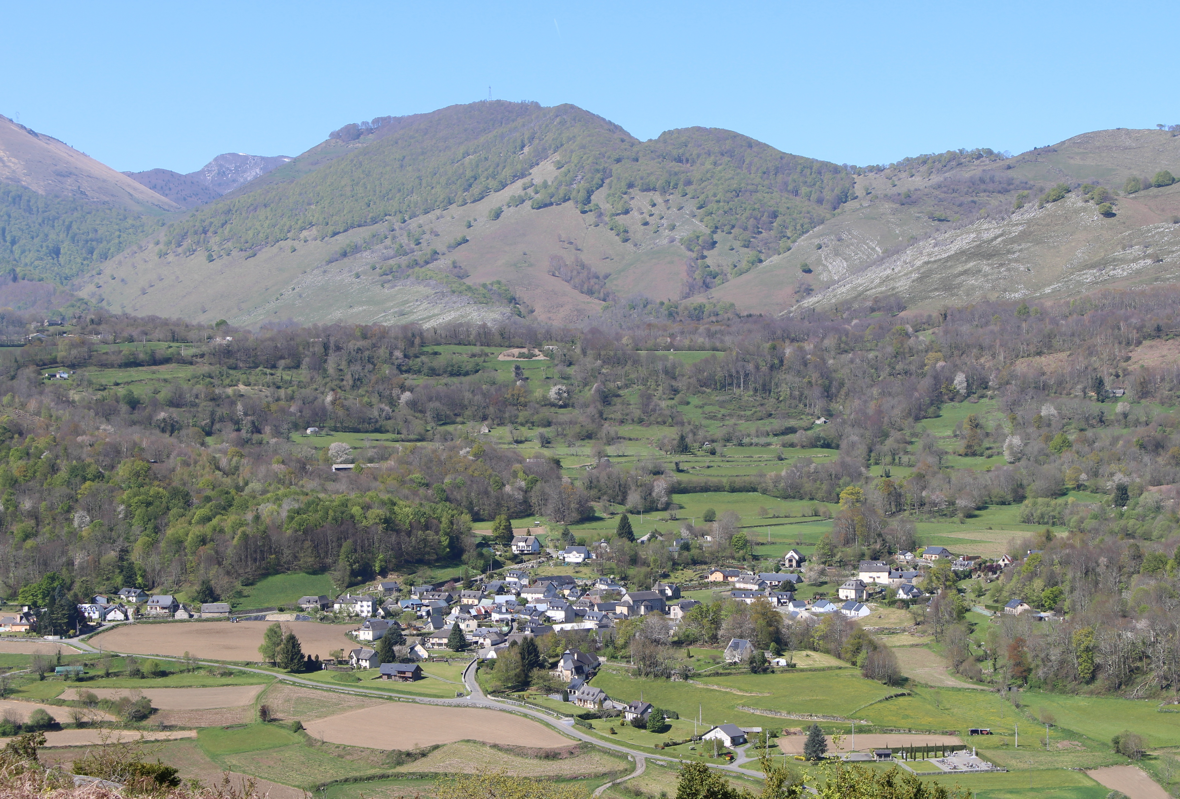 Omex (Hautes-Pyrénées, France).